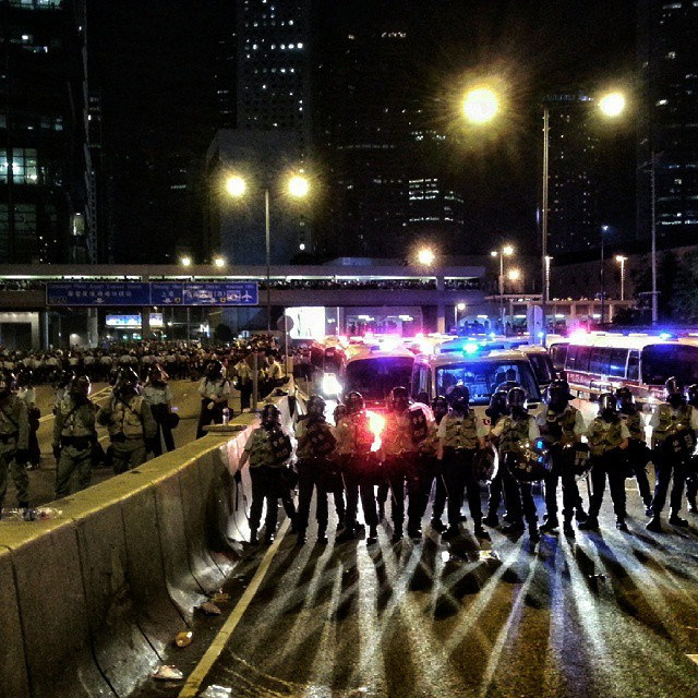 2014 Hong Kong protests